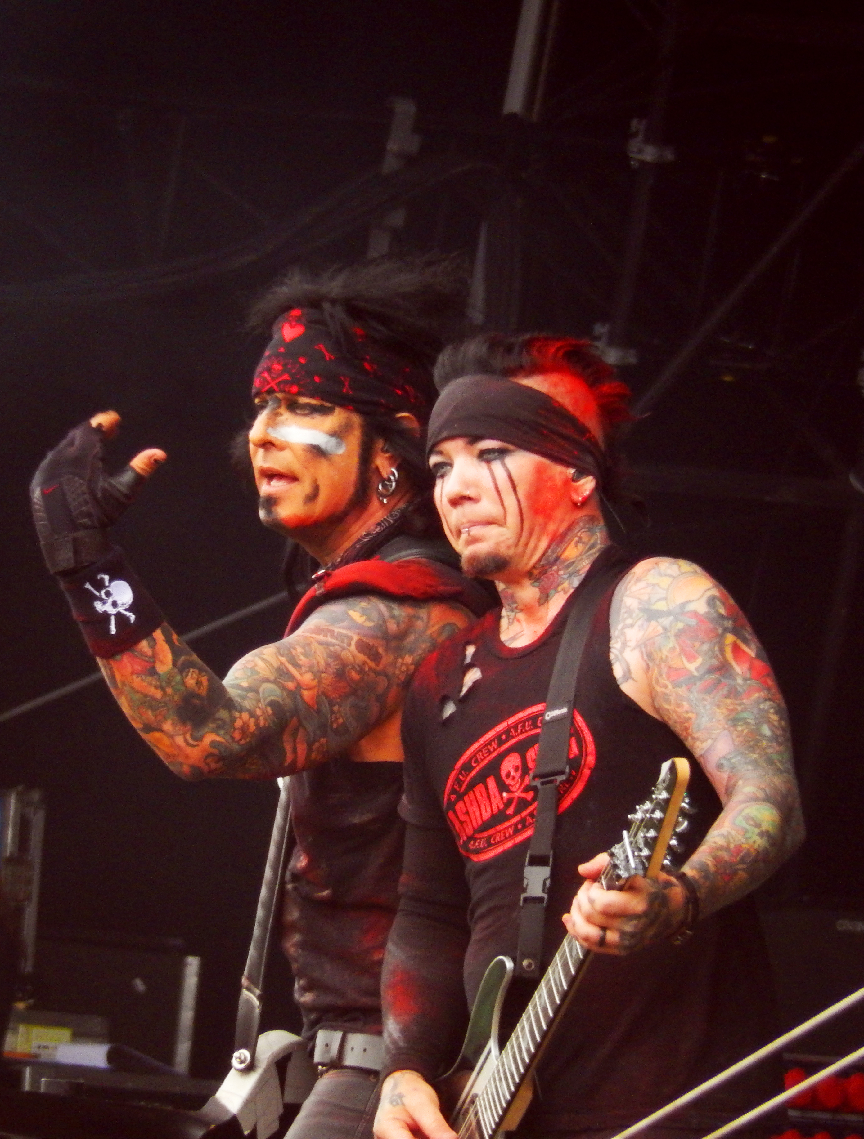 SixxA.M au Hellfest 2016